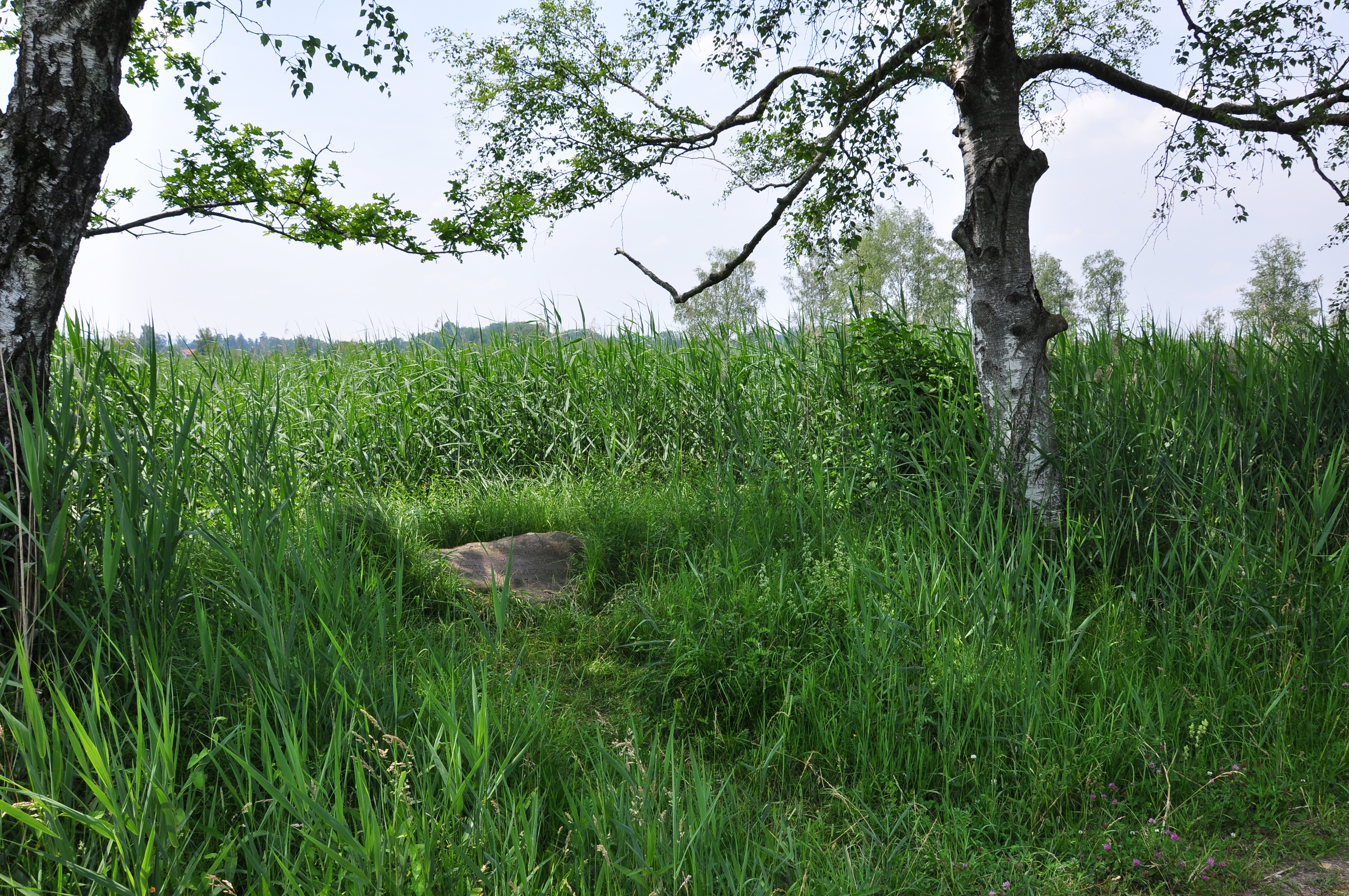 Robenhuserriet in Wetzikon (Switzerland)